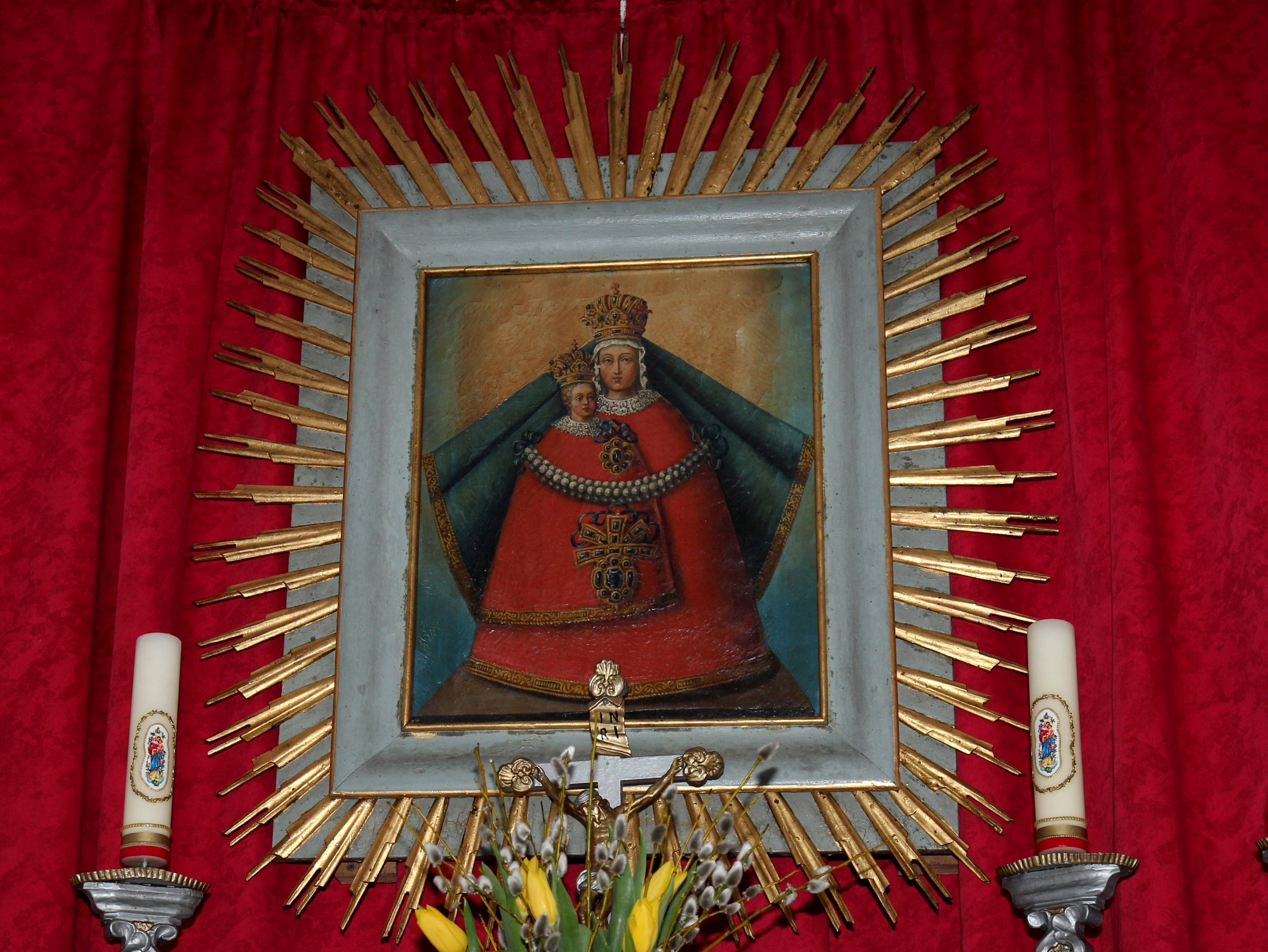 Kapelle Mariae Namen, Schwarzenbichlkapelle/Fellkapelle